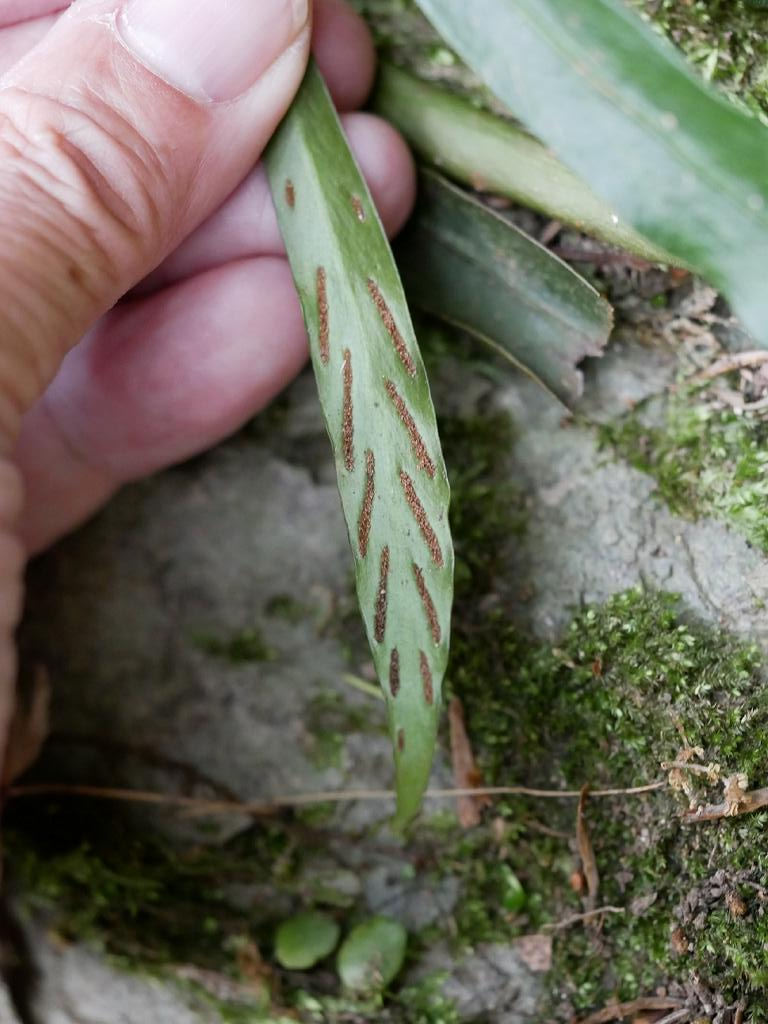 2019/05/19 和歌山県田辺市：Tanabe City. Wakayama Pref. Japan